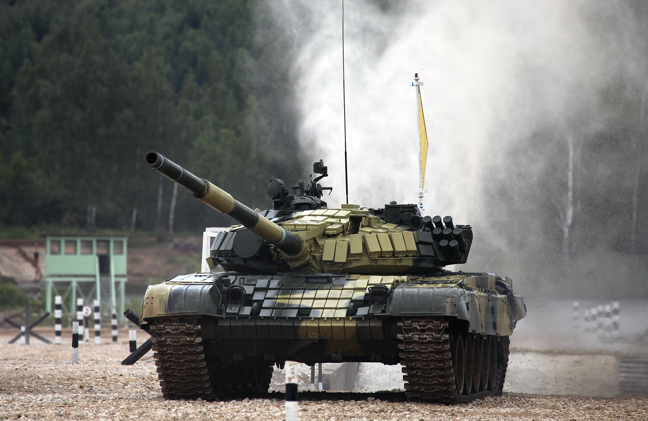 Т-72Б